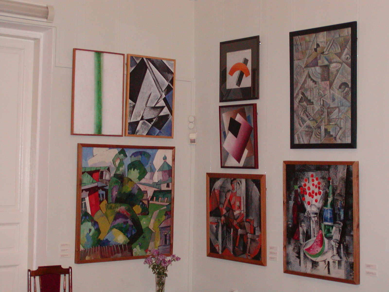 Русский авангард в Ростовском кремле